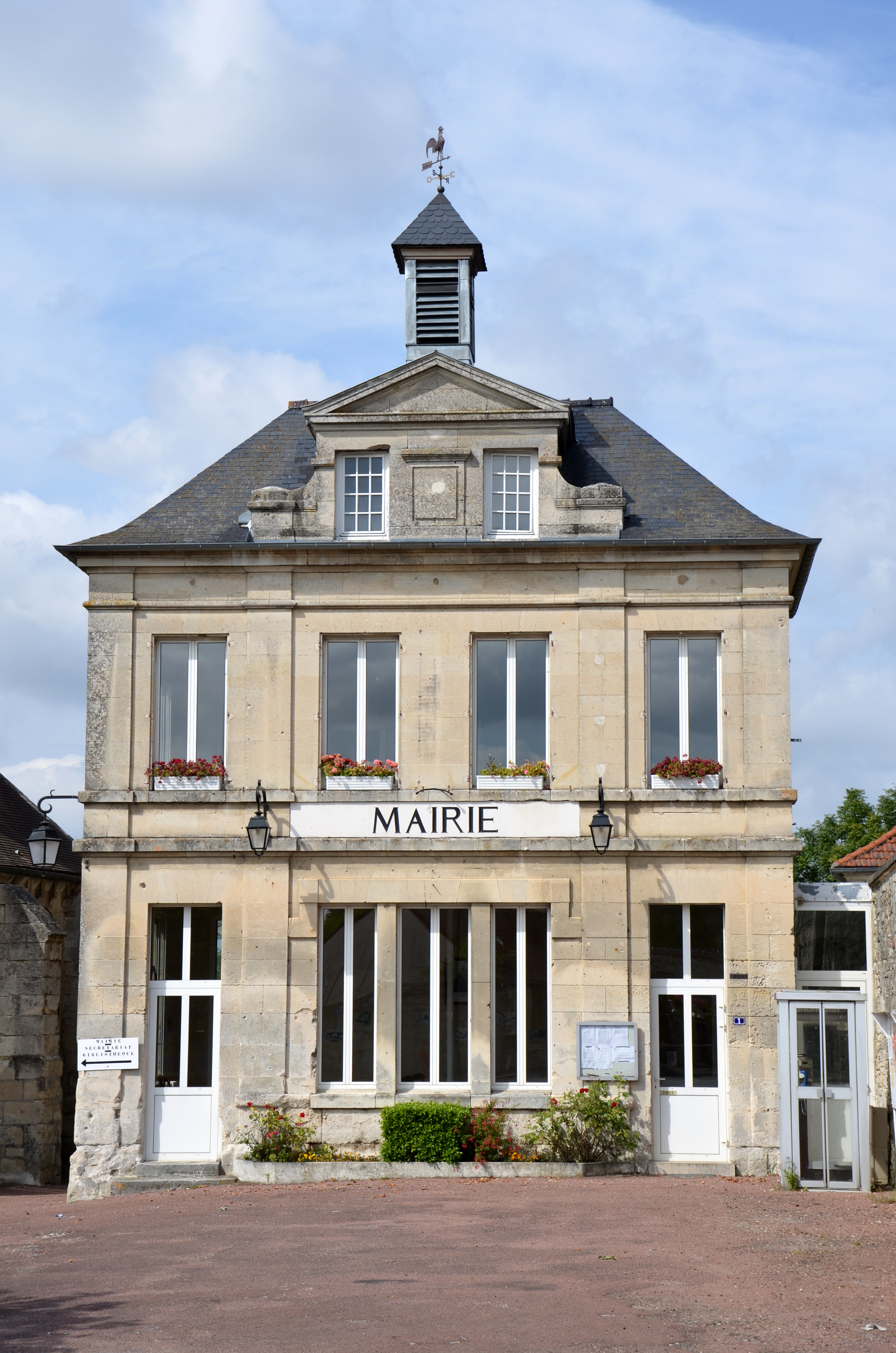 Mairie de Coyolles, Aisne, Picardie, France